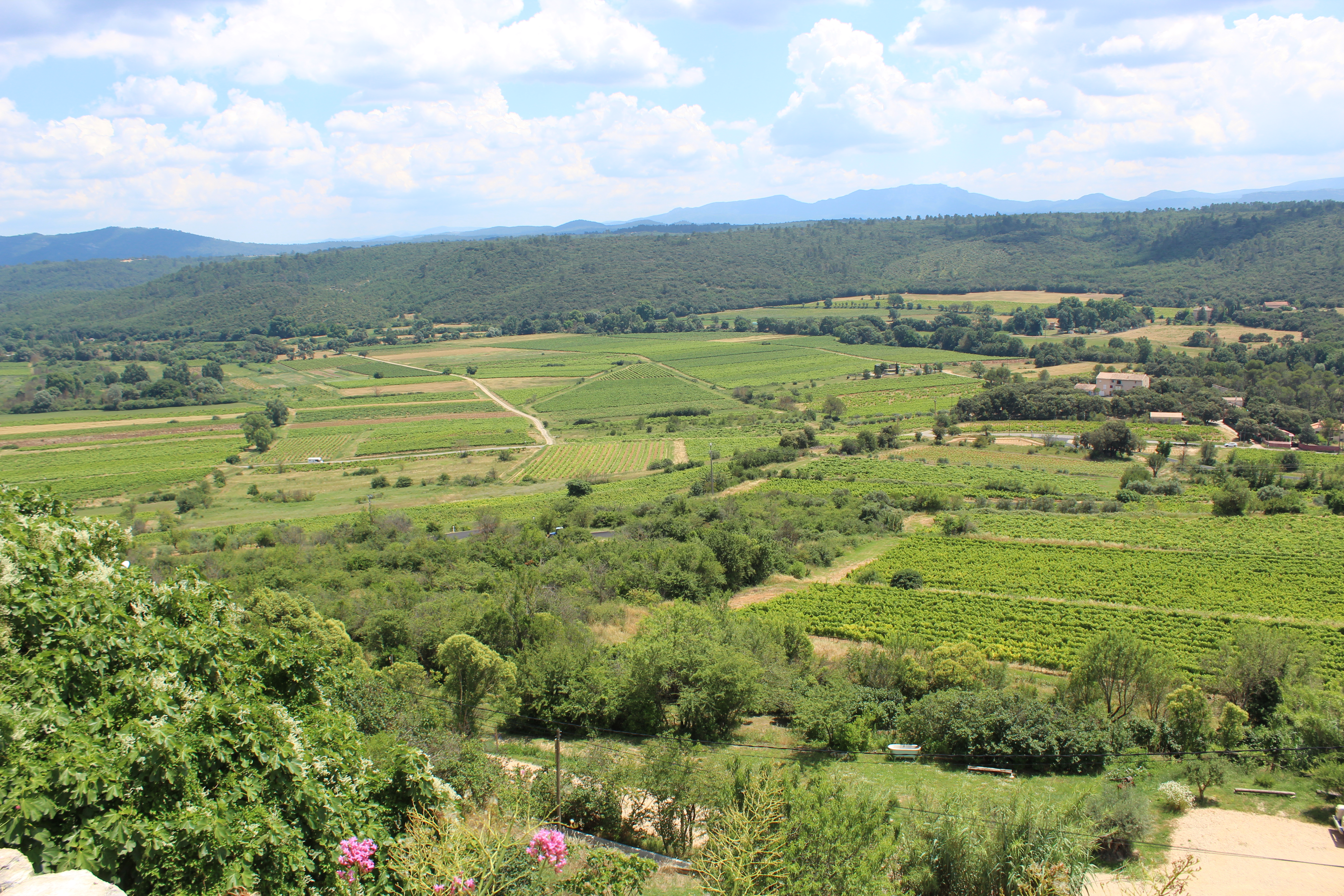 Panorama de puis le village